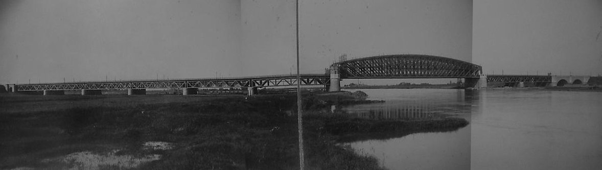 Brug bij Westervoort, gezien vanaf de rechter oever benedenstrooms